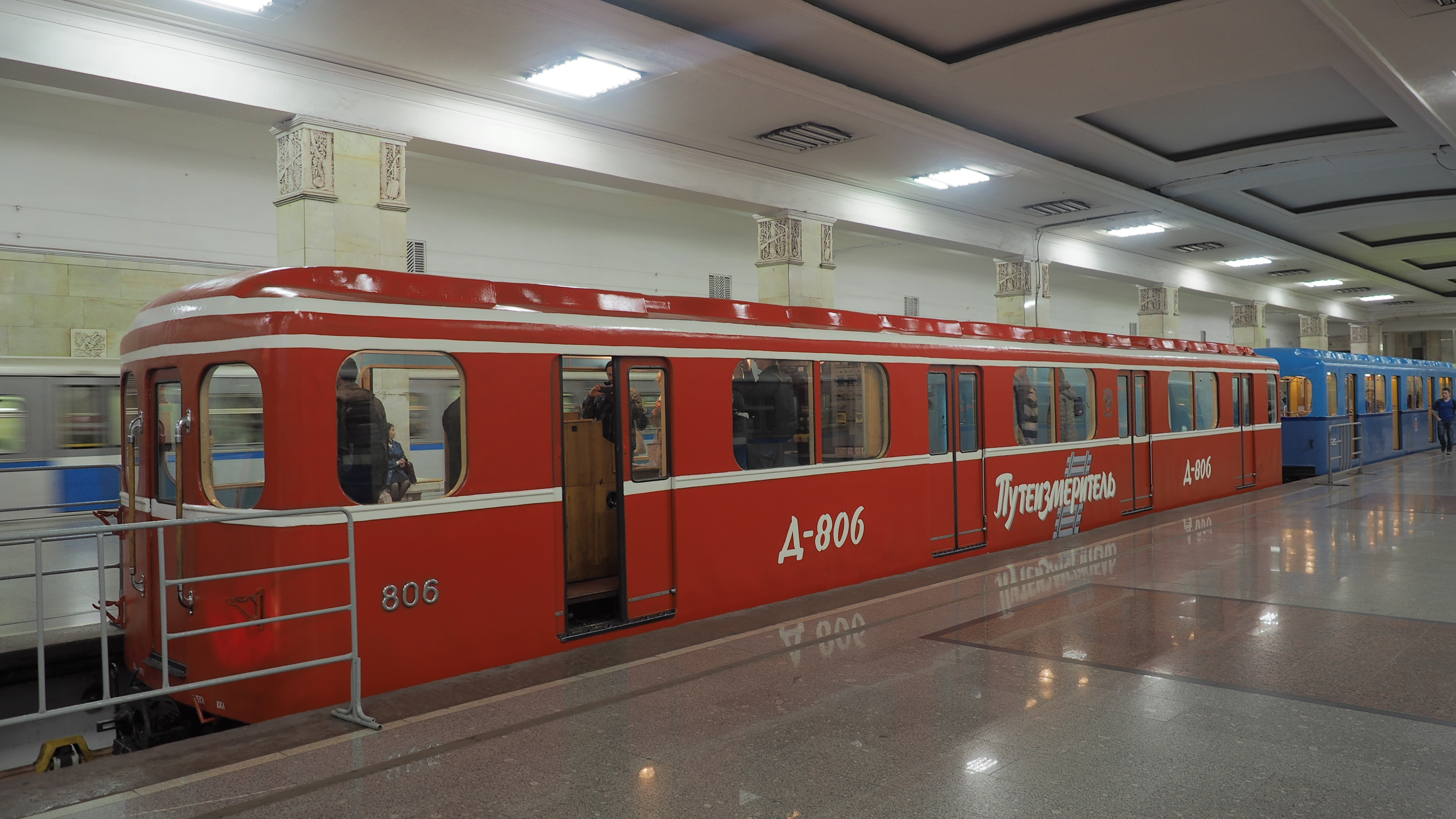 Музейный метровагон УМ5 806. Выставка подвижного состава и парад поездов к 80-летию Московского метрополитена 15 мая 2015 года. On May 15 and 16, 2015, Moscow Metro celebrated its 80th anniversary. For the first time, recently restored historical cars were exhibited at the siding track of Partizanskaya station. 15 и 16 мая 2015 в Москве отмечалось 80 лет Московскому метро. Впервые была устроена выставка исторических вагонов. Они были расставлены на 3 пути станции Партизанская.